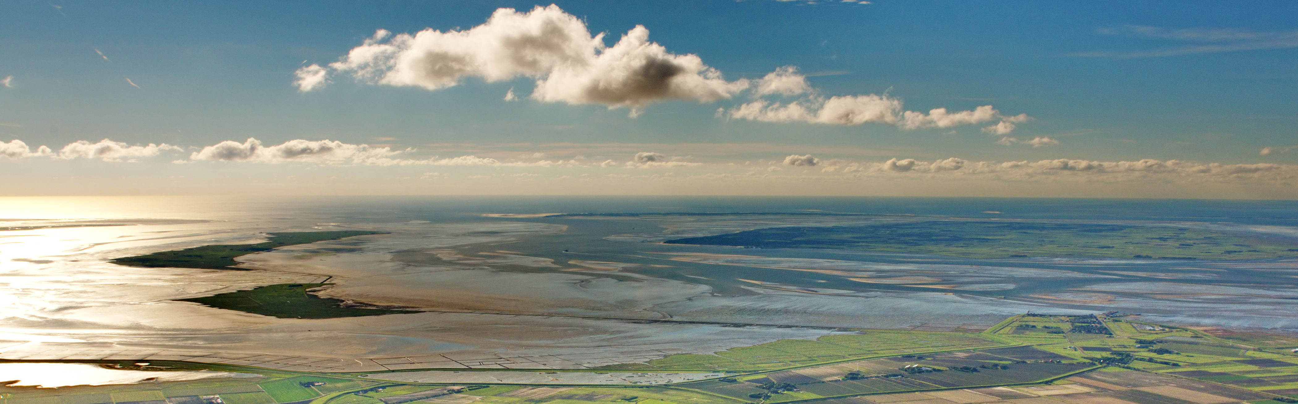 Fotoflug über das nordfriesische Wattenmeer - Langeneß, Oland, hinten Amrum, rechts Föhr